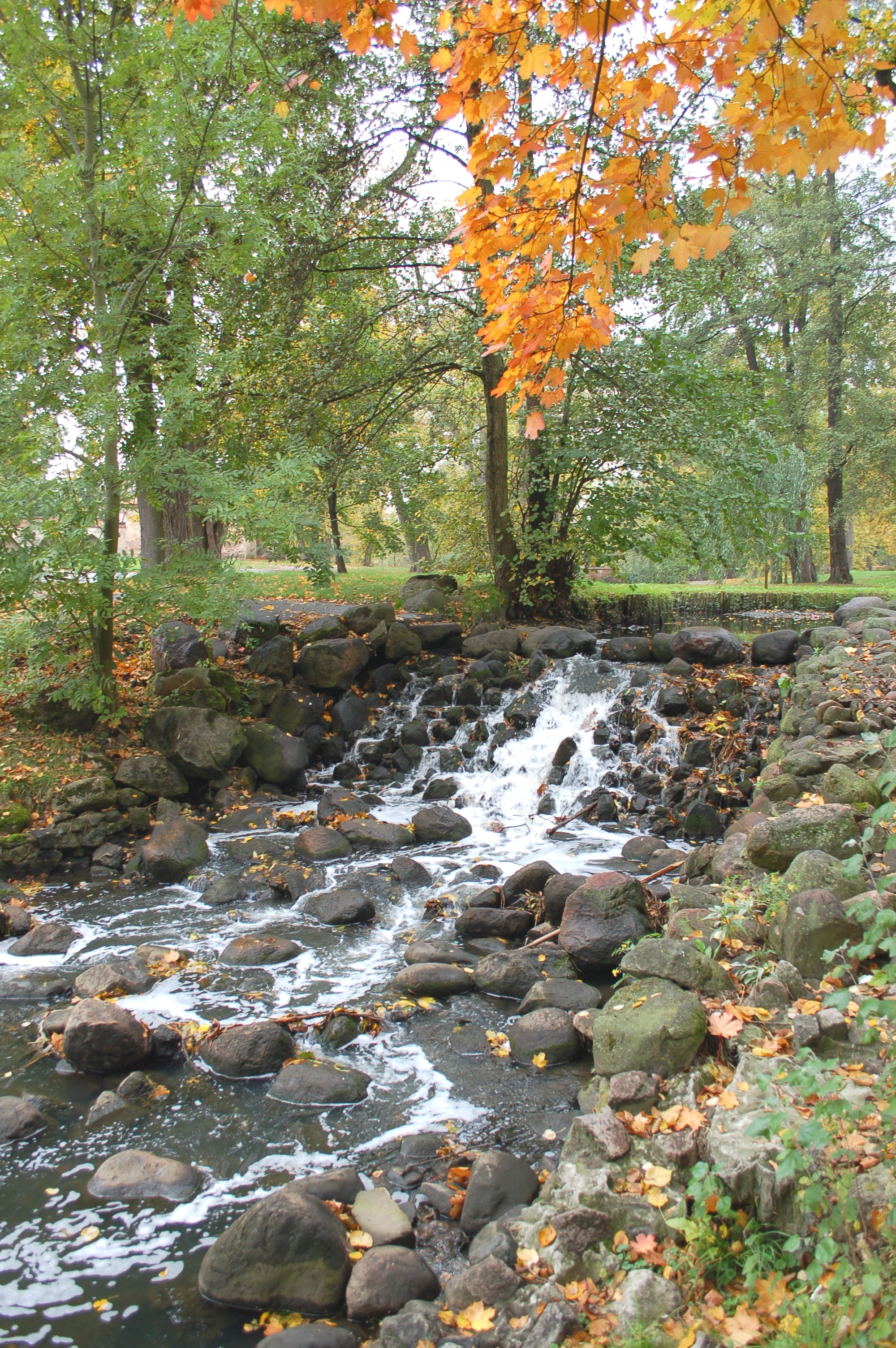 Wilanów